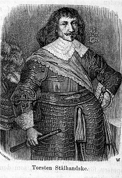 Torsten Stalhandske